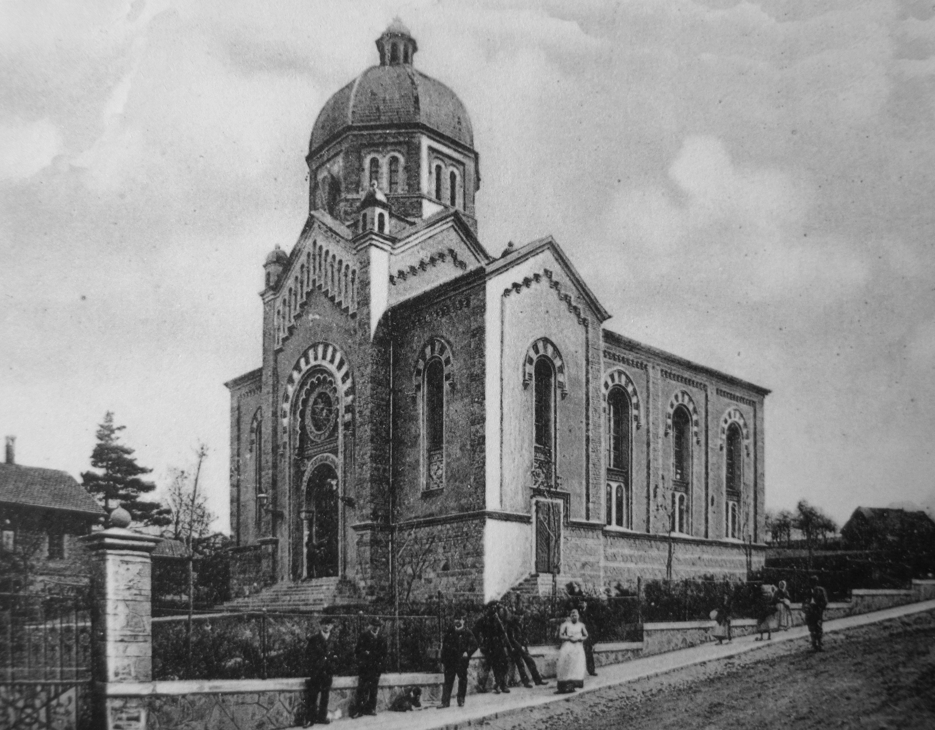 Synagoga żydowska w Białej Krakowskiej